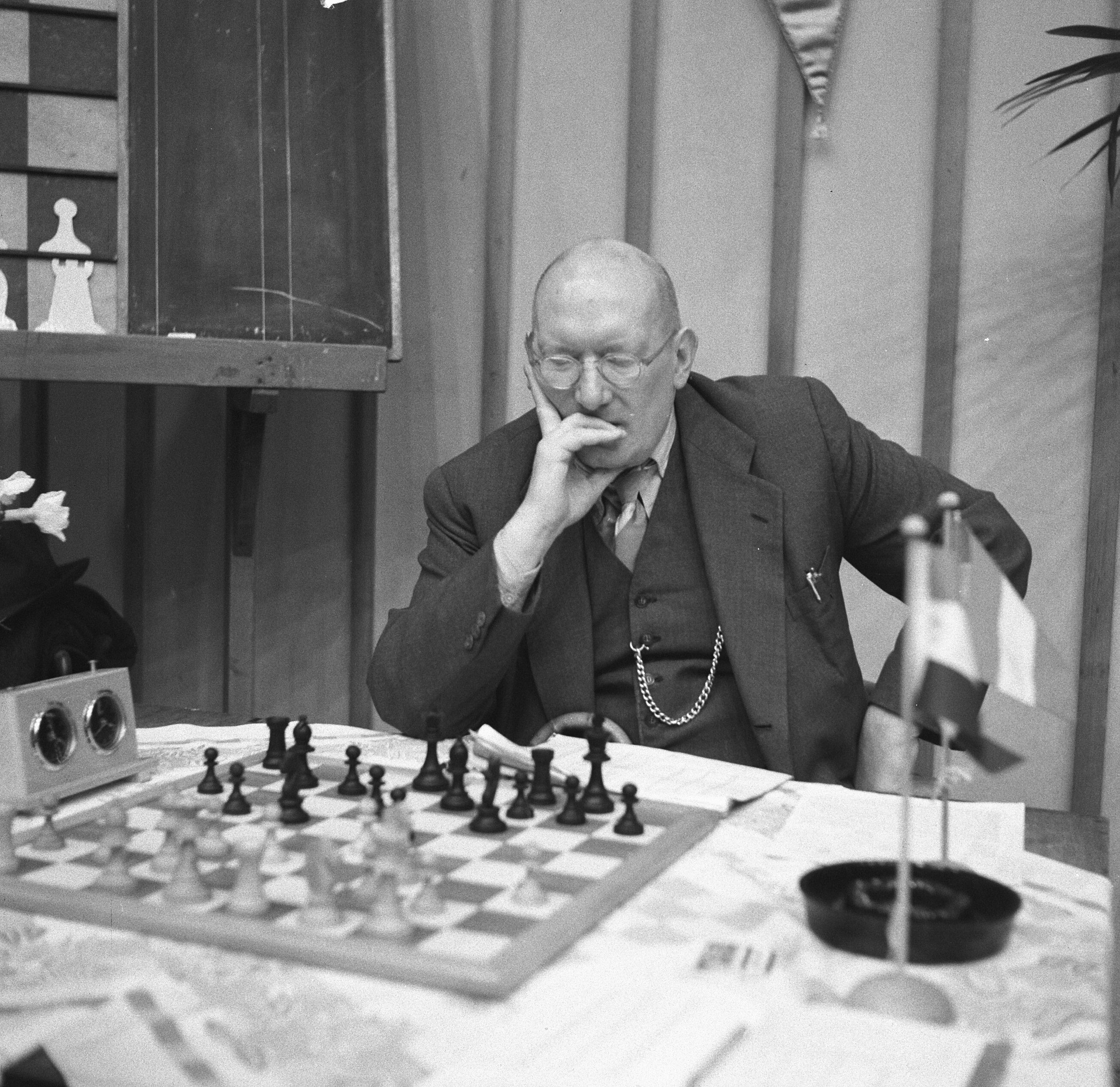 Collectie / Archief : Fotocollectie Anefo Reportage / Serie : [ onbekend ] Beschrijving : Hoogovenschaaktoernooi te Beverwijk, Grunfeld Datum : 17 januari 1961 Locatie : Beverwijk Persoonsnaam : Grunfeld Instellingsnaam : Hoogovenschaaktournooi Fotograaf : Nijs, Jac. de / Anefo Auteursrechthebbende : Nationaal Archief Materiaalsoort : Negatief (zwart/wit) Nummer archiefinventaris : bekijk toegang 2.24.01.03 Bestanddeelnummer : 911-9895